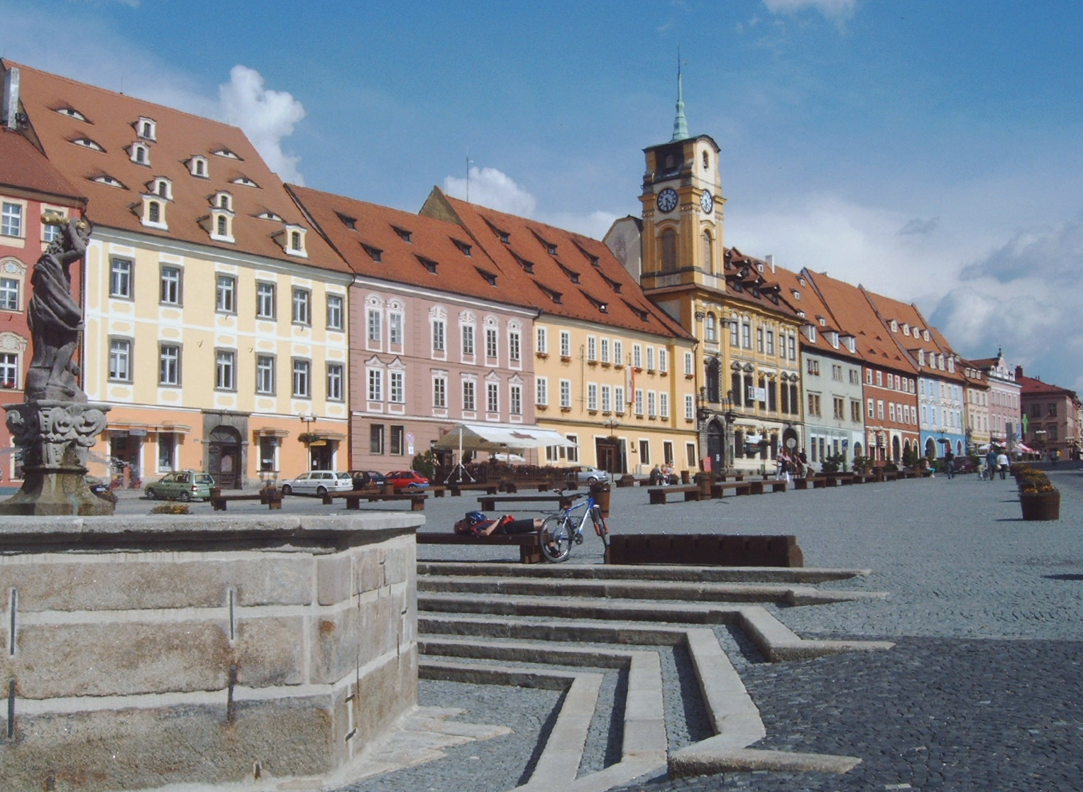 Der Marktplatz in Cheb (Eger) – vorne links der Herkulesbrunnen.